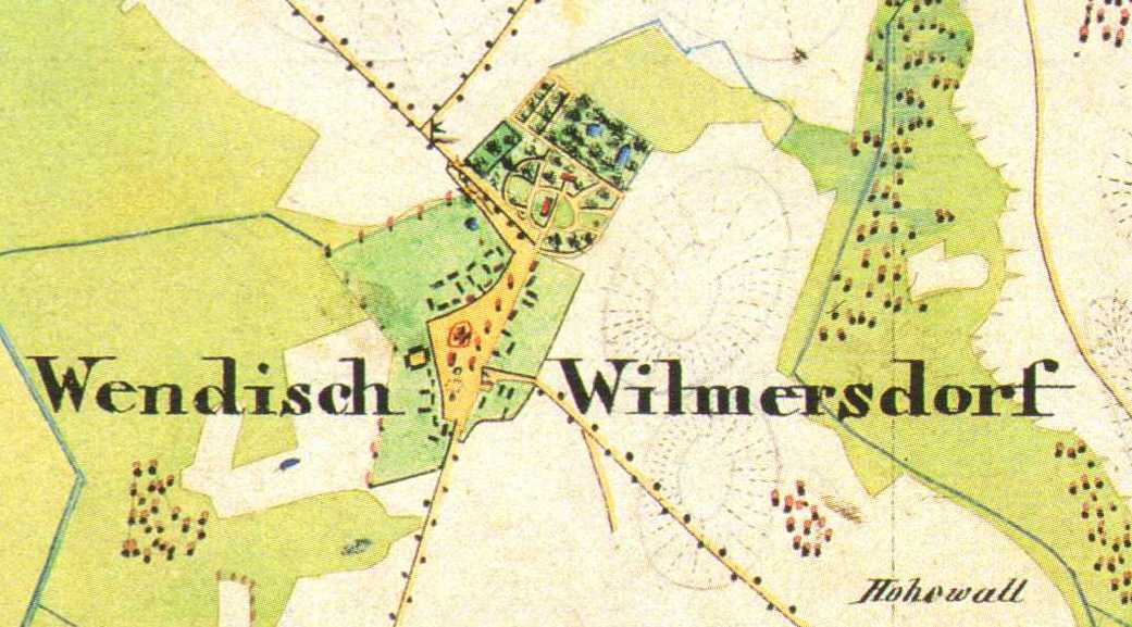 Märkisch Wilmersdorf, Stadt Trebbin, Brandenburg, Deutschland, Urmesstischblatt Blatt Trebbin 3745, von 1840